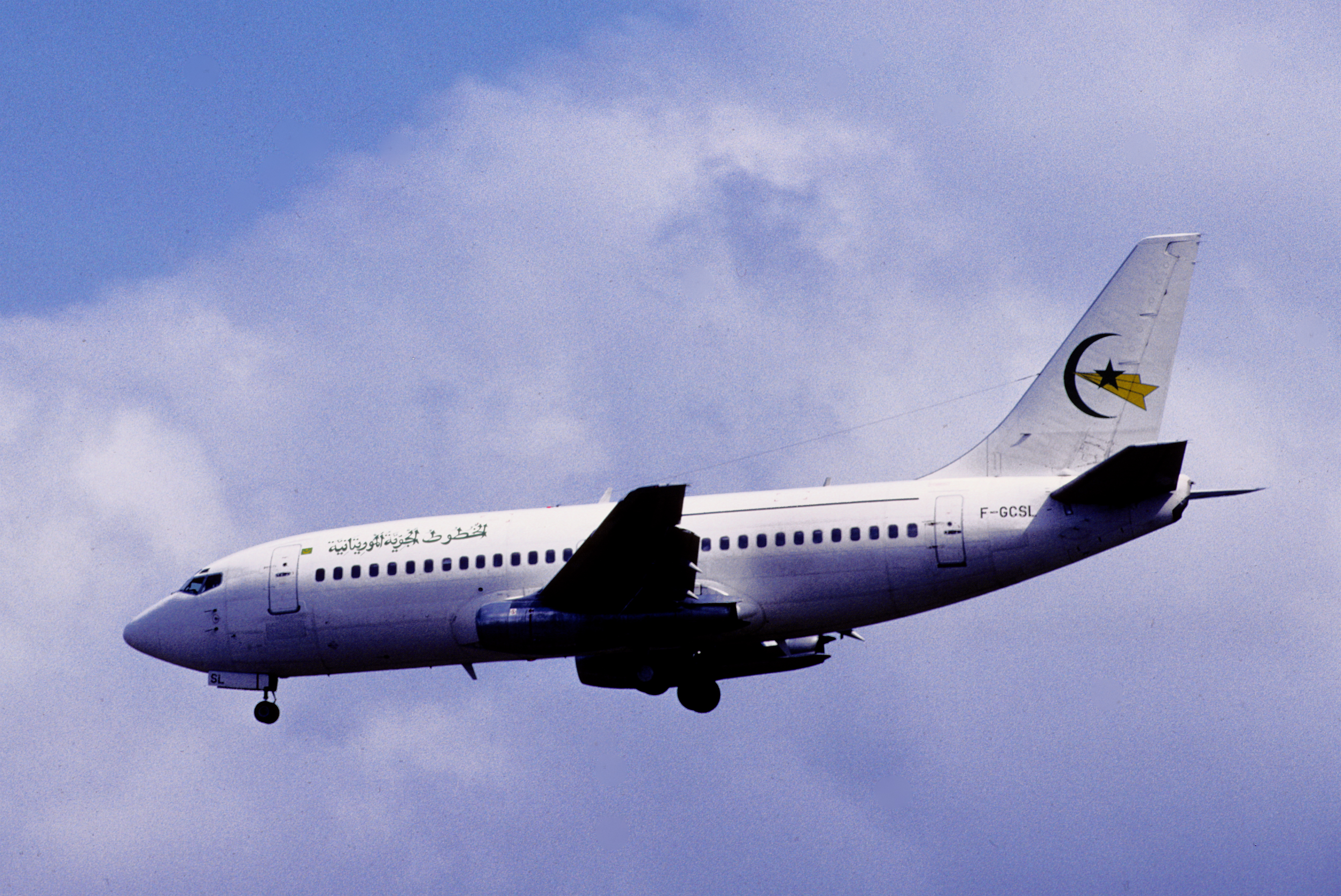 Air Mauritanie Boeing 737-200; F-GCSL@LPA, February 2002